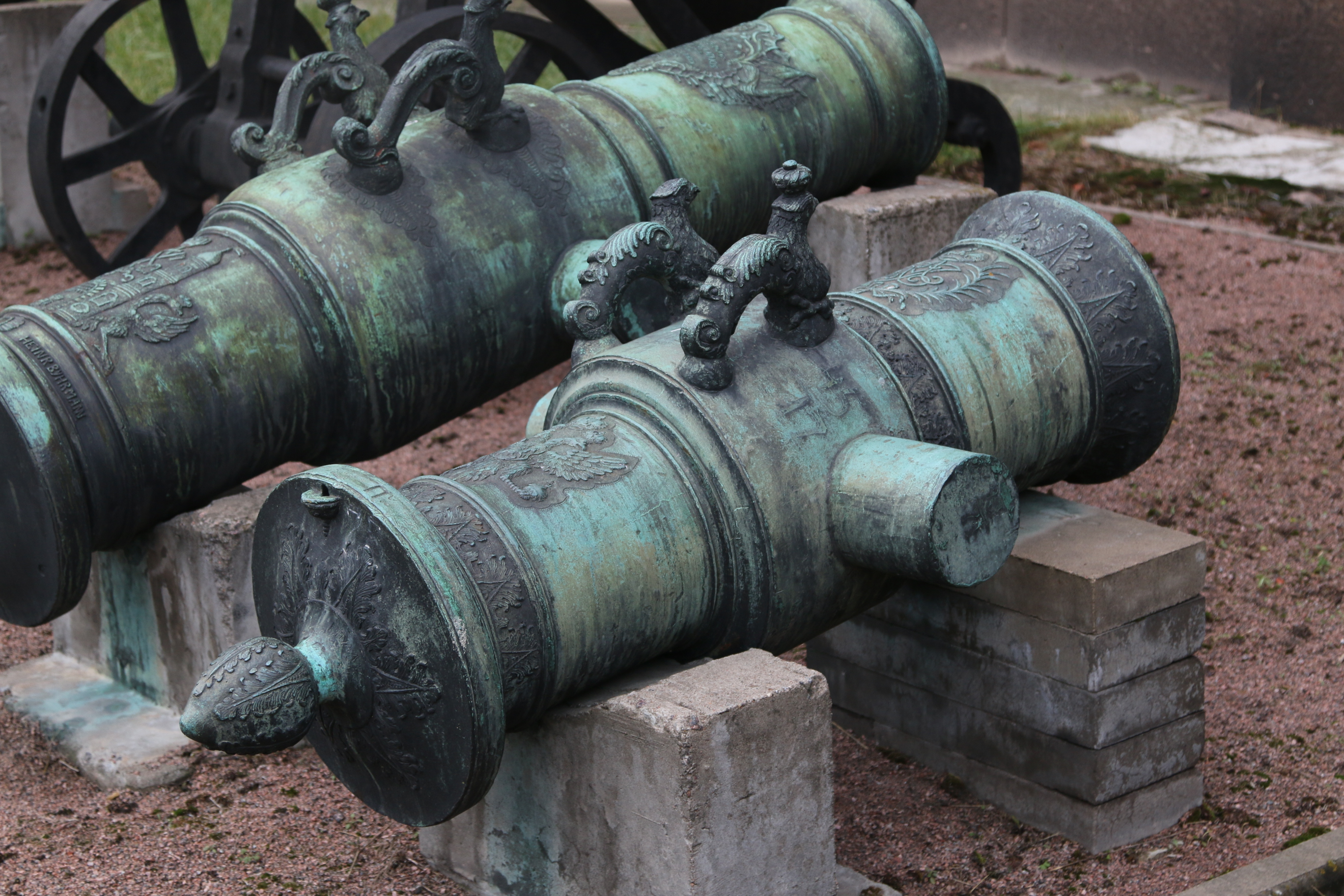 Ствол 1 пудовой (200 мм) осадной гаубицы, бронзовый. Отлит в первой половине XVIII века. Масса 700 кг.